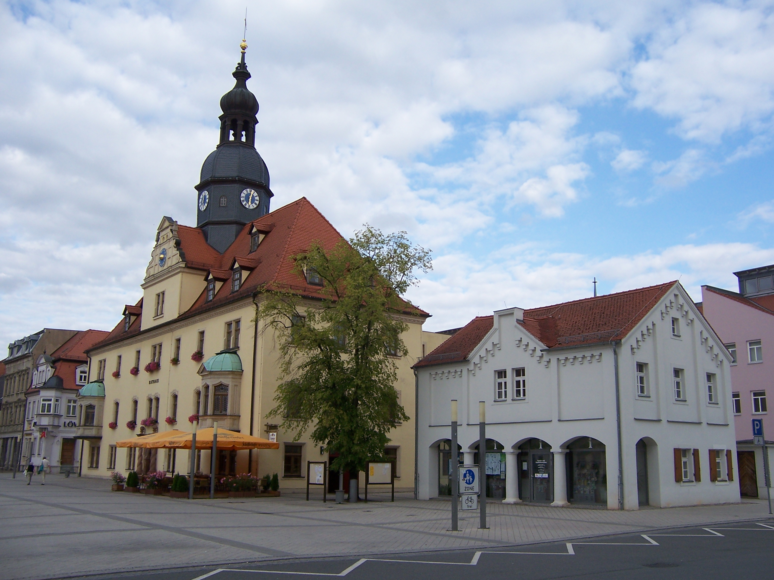 Rathaus mit Alter Wache in Borna